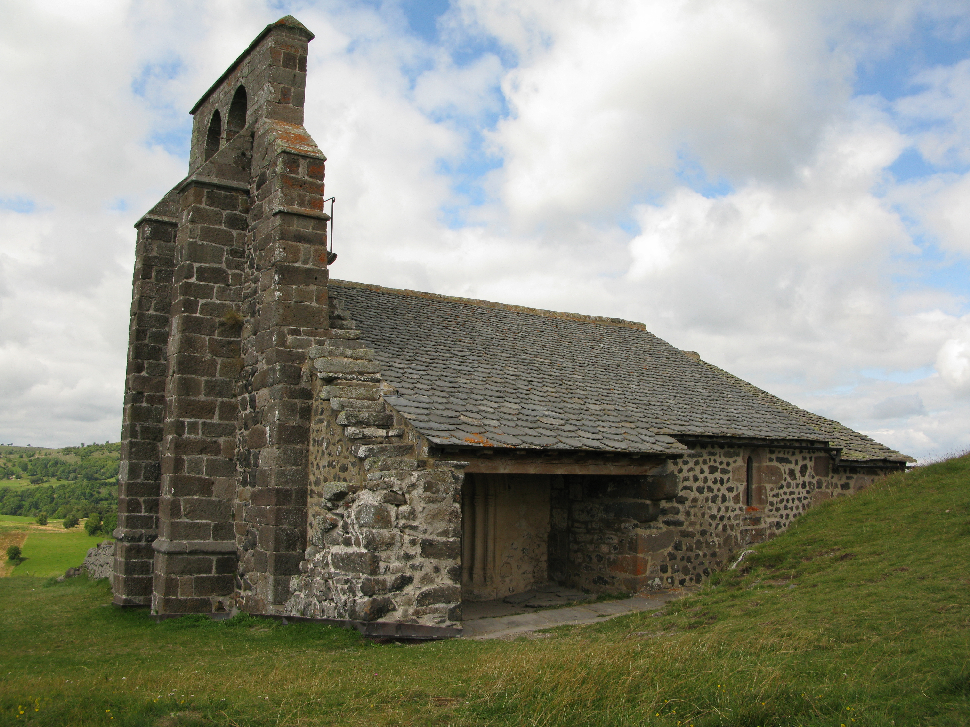 Vue de trois-quart sur la chapelle Saint-Antoine depuis le sud. Sur la gauche, le clocher à peigne. Au centre, la porte d'entrée. La toiture principale est couverte d'ardoises. La toiture du choeur est couverte de lauzes. Sur la droite du clocher, un escalier extérieur en pierre permet d'accéder au clocher.